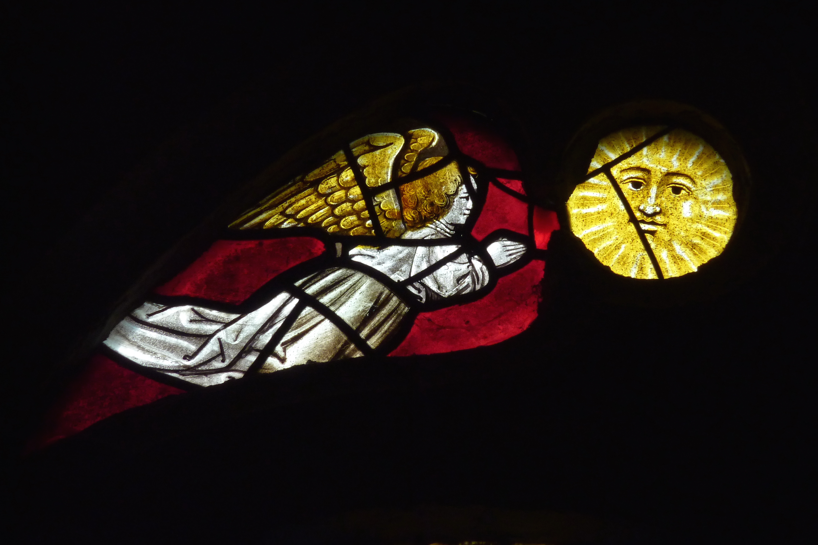 Katholische Kirche Saint-Remi in Ceffonds im Département Haute-Marne (Champagne-Ardenne/Frankreich), Bleiglasfenster (baie 14) aus dem frühen 16. Jahrhundert; Darstellung: Hl. Katharina, hl. Margareta, hl. Barbara; Maßwerk: Engel und Sonne (Ausschnitt) .